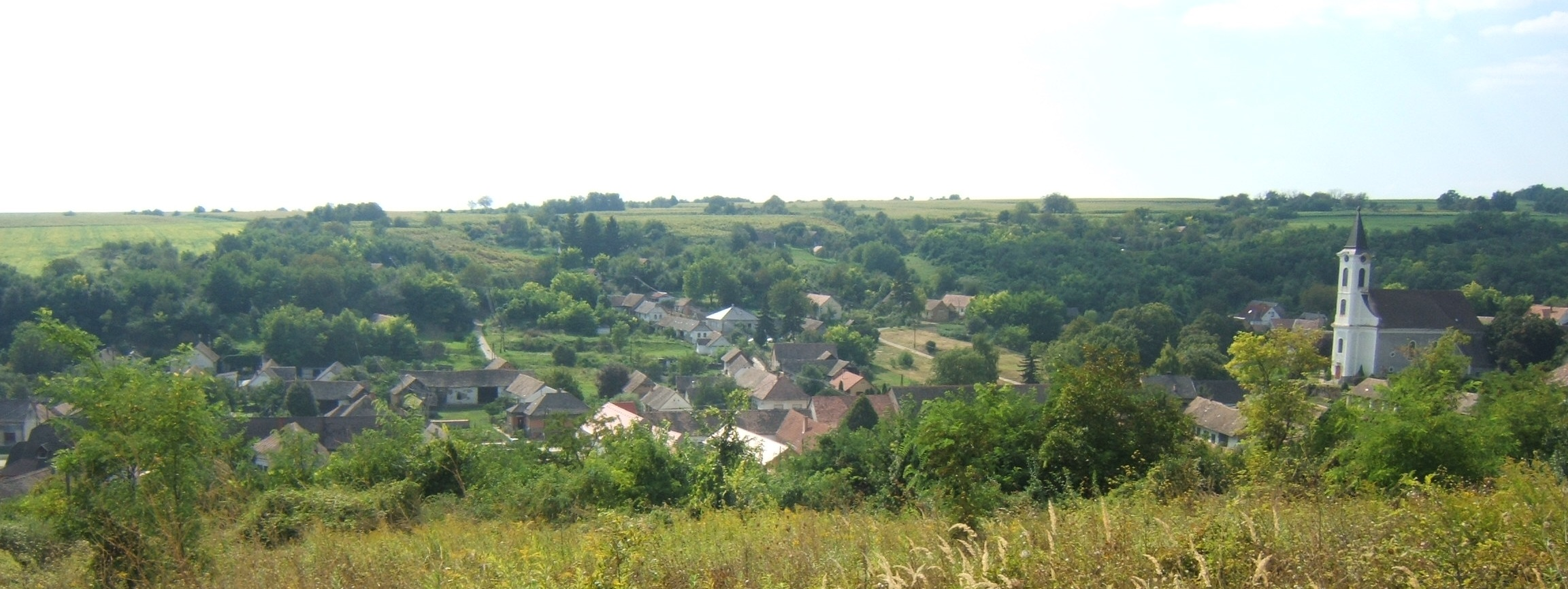 Szebény látképe